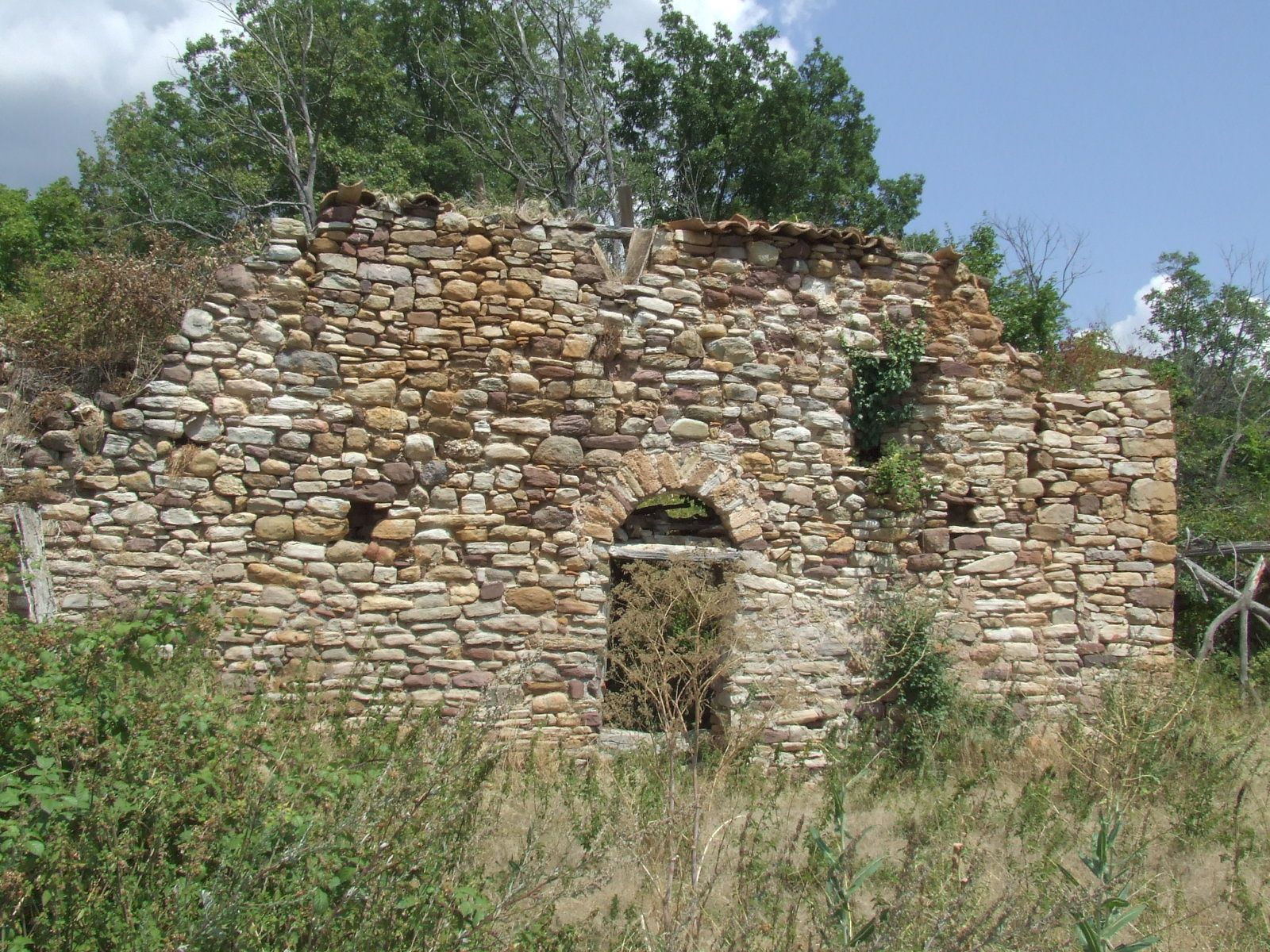 Sant Genís de Bellera (Larén, Senterada, Pallars Jussà)